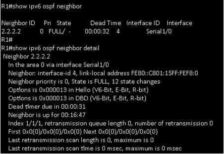 Монгол: Алдааны мессеж2